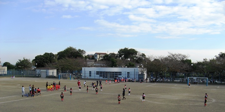 神奈川県横須賀市はまゆう公園グラウンド